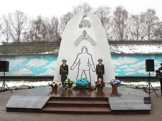 Пожежним